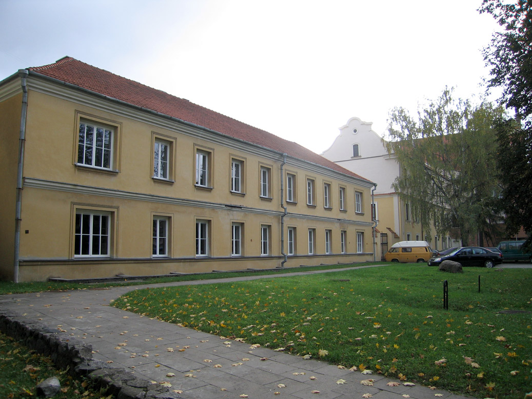 Vilnius Art Academy